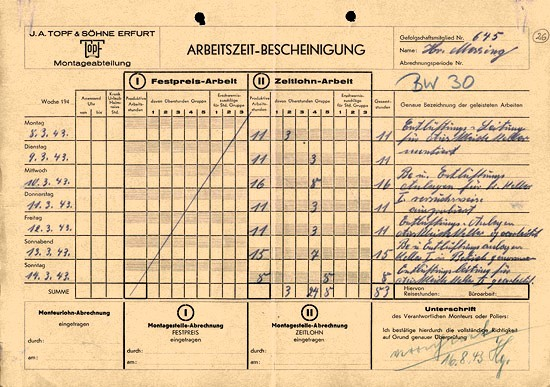 Arbeitszeitbescheinigung bezüglich dem Einbau einer Entlüftungsanlage zwischen 8.3.43 und 14.3.43 in das Krematorium II (BW30) in Auschwitz Birkenau